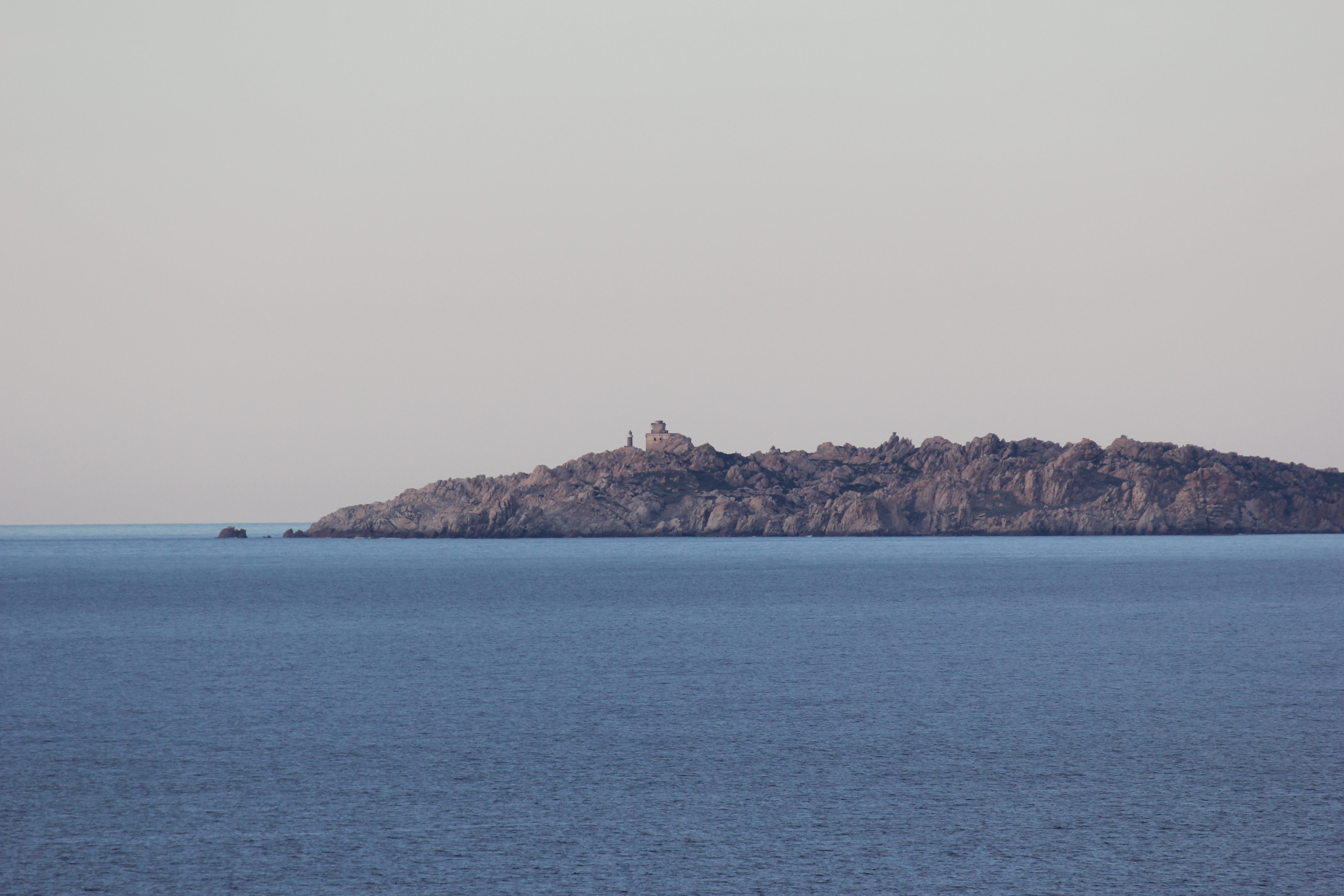 Arcipelago di La Maddalena